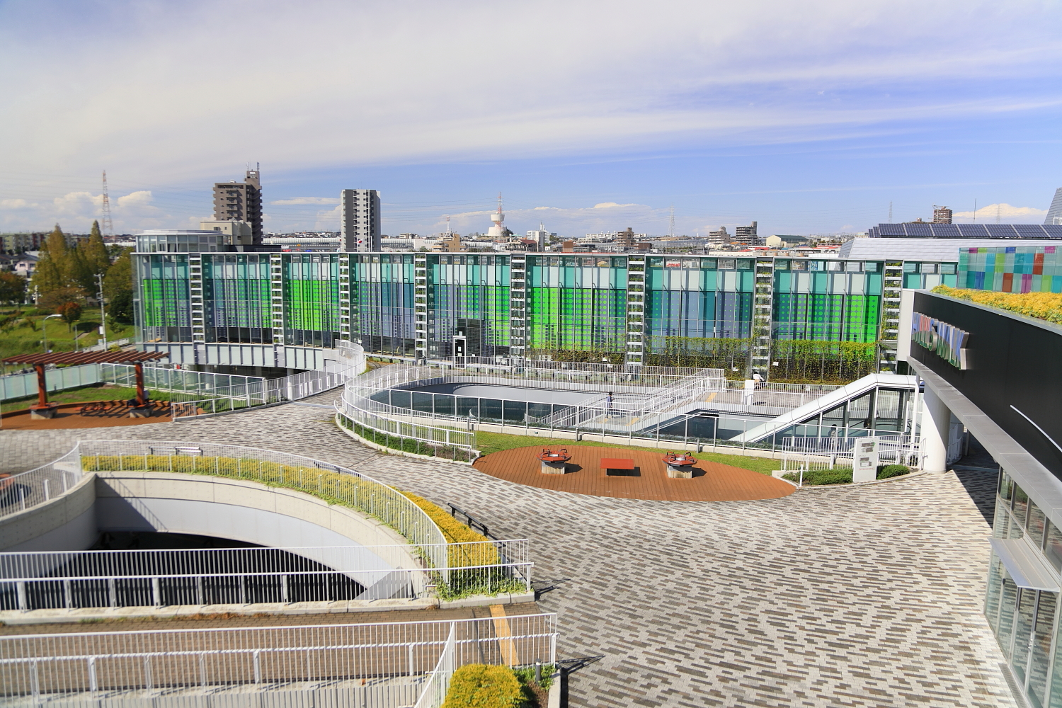 ガーデンズテラスよりユメリア徳重を望む（2018年（平成30年）10月）